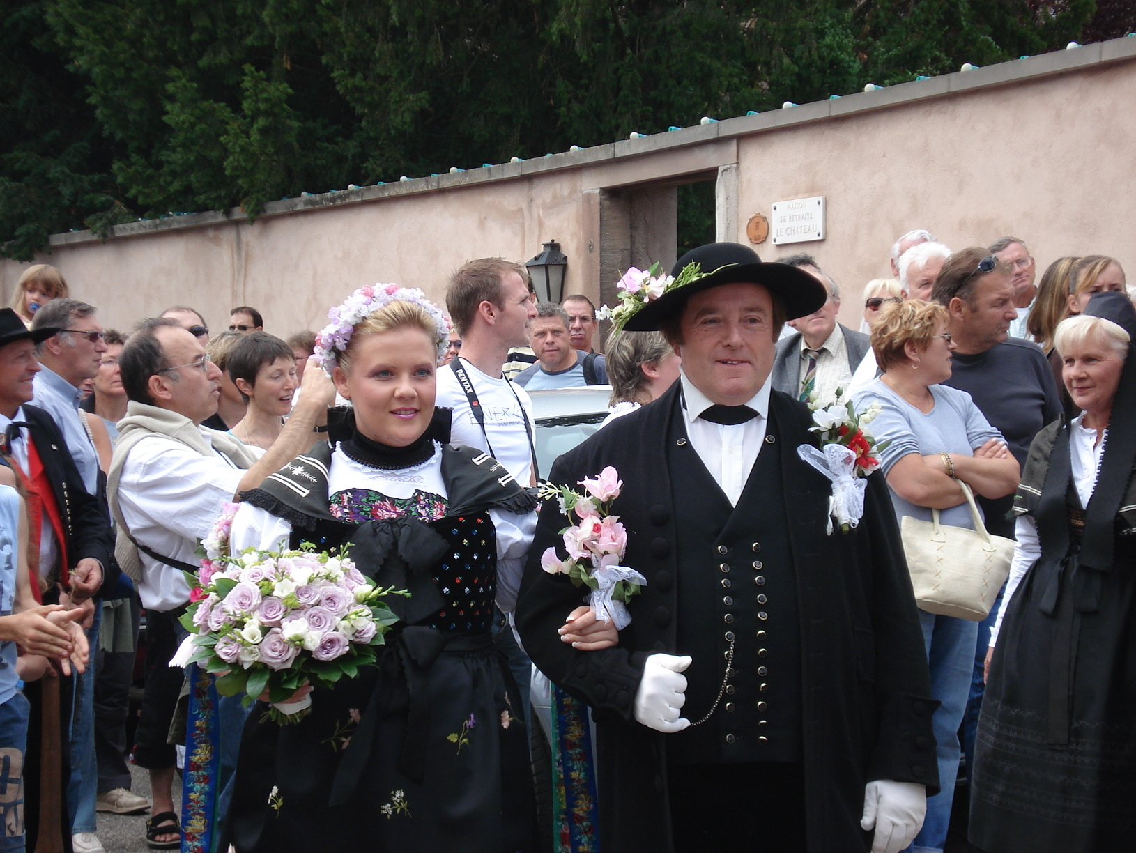 l'ami Fritz e la belle Susel Marlenheim